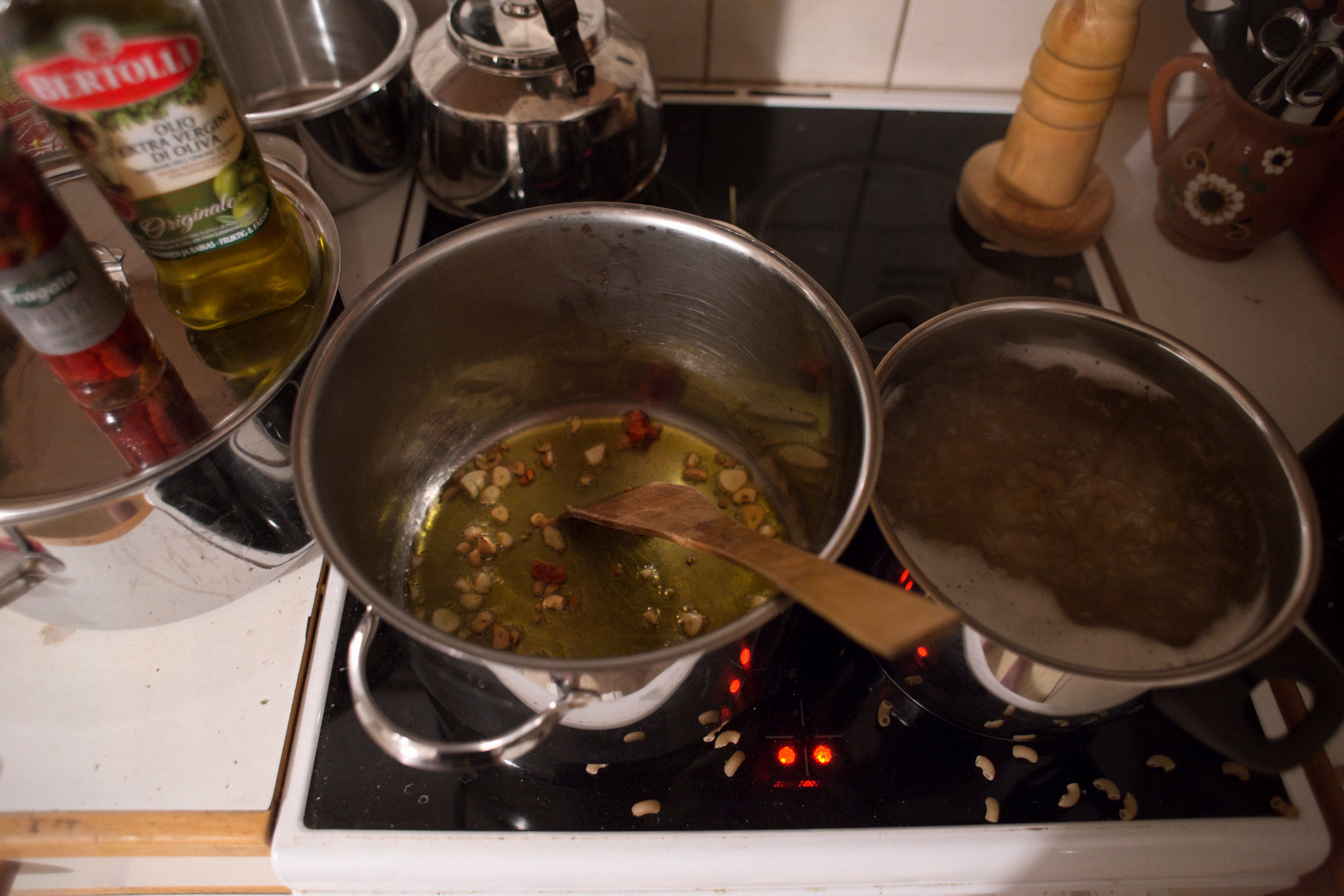 Valkosipulia kuullotetaan neitsytoliiviöljyssä